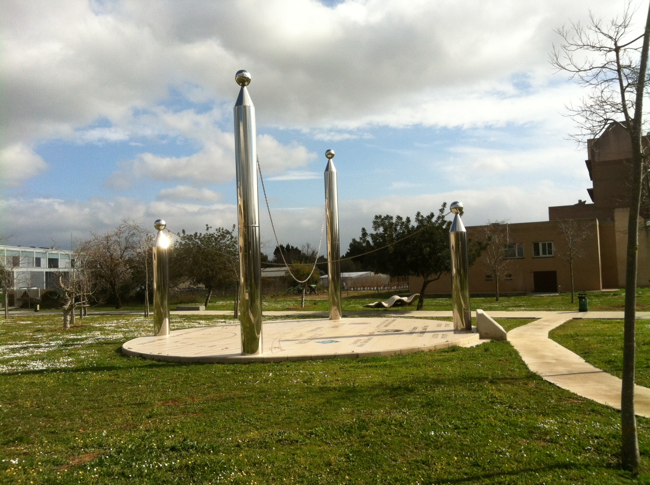 rellotge de sol de la Universitat de les Illes Balears